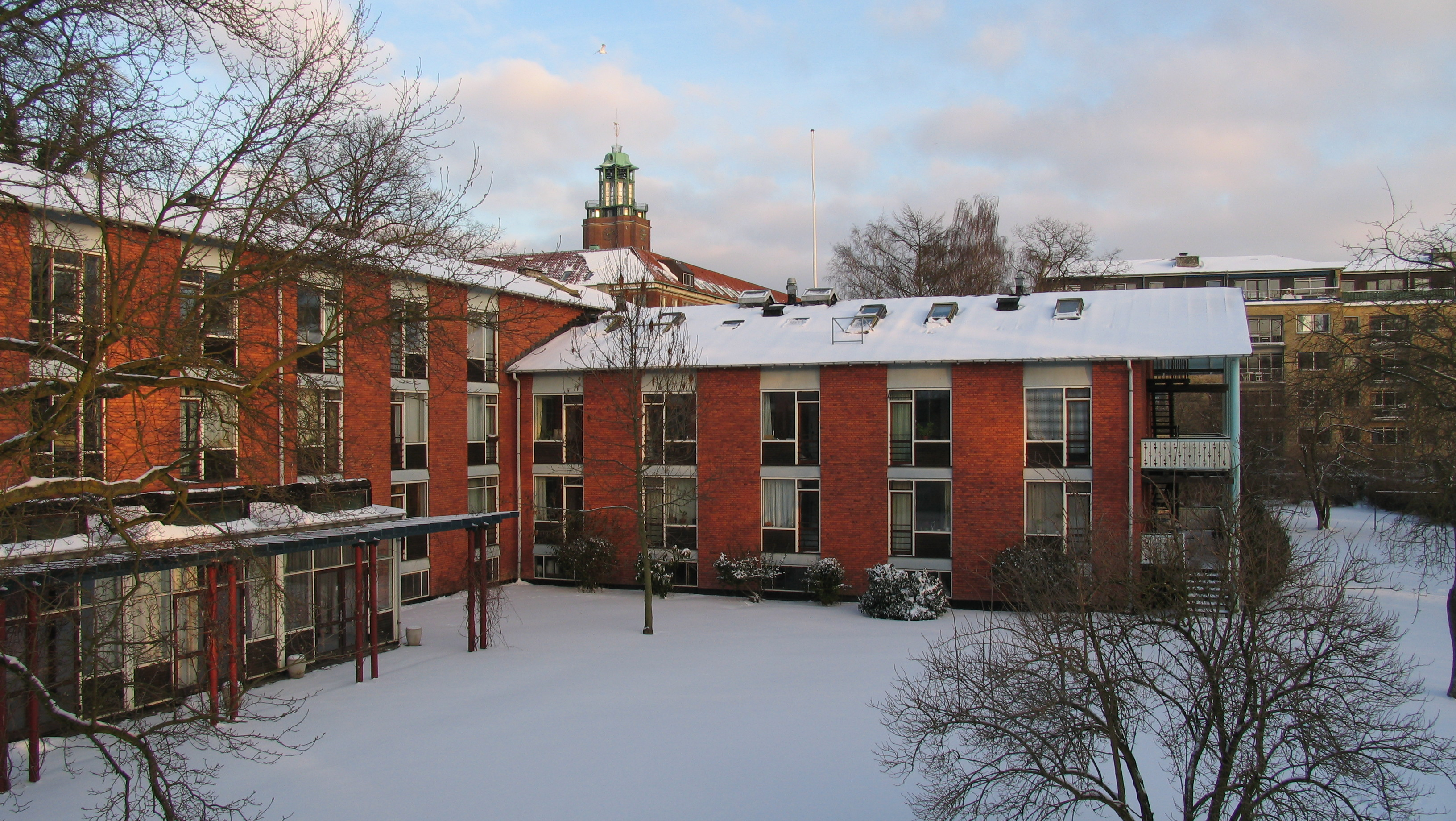 Hassagers Kollegium and 4. maj Kollegiet on Frederiksberg, Denmark. A dormitory. Picture by Christian Aastrup, January 24 2006